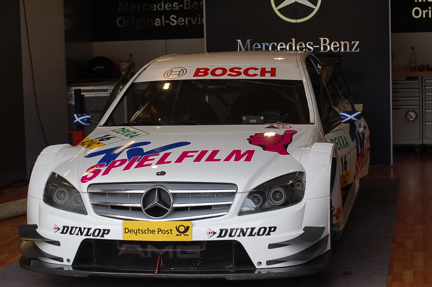 Susie Stoddarts Wagen in Oschersleben 2008 (DTM)